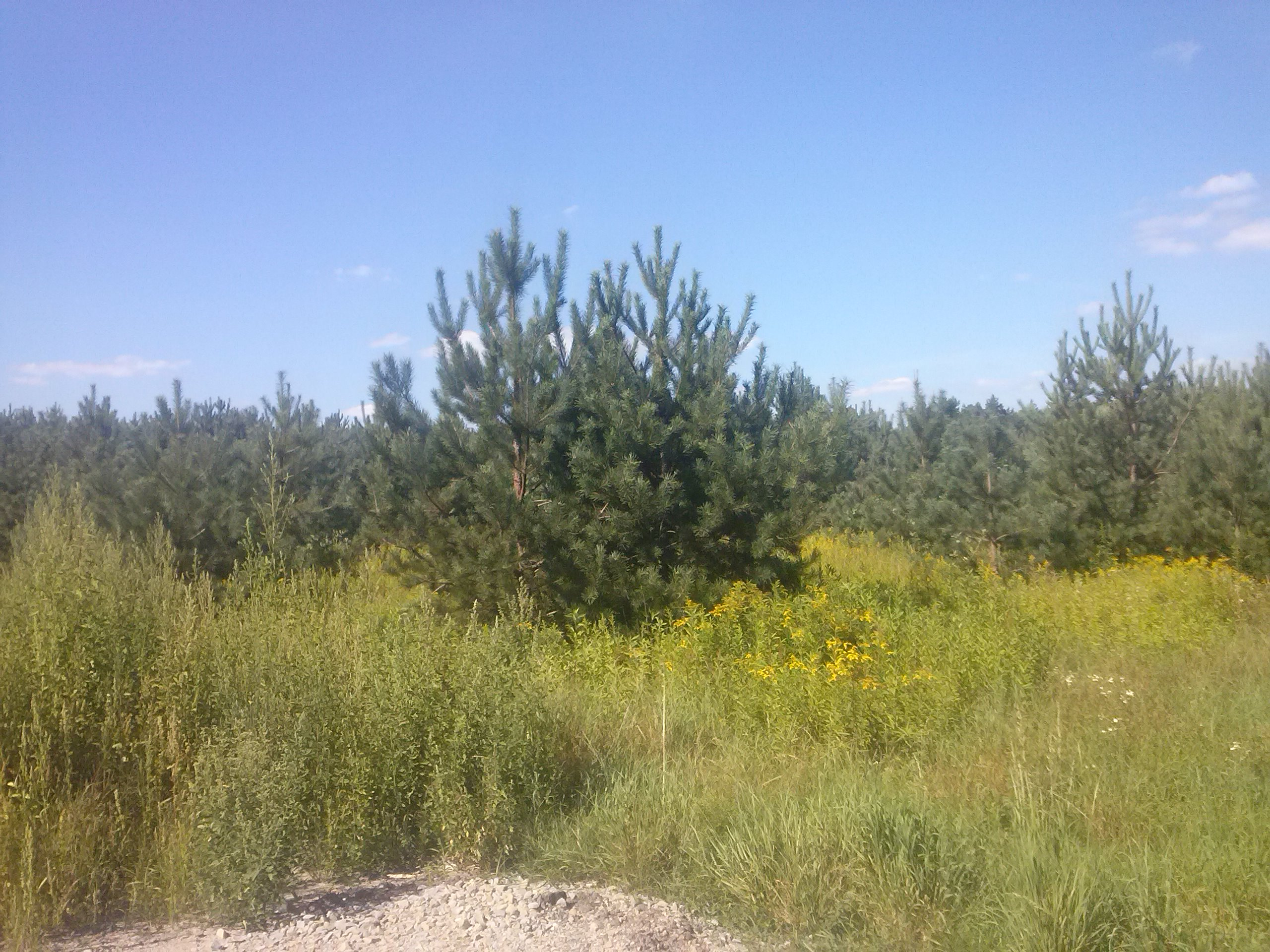 Nowe zalesienia na polach Woli Buchowskiej (Dąbrowy), przy DW 77.